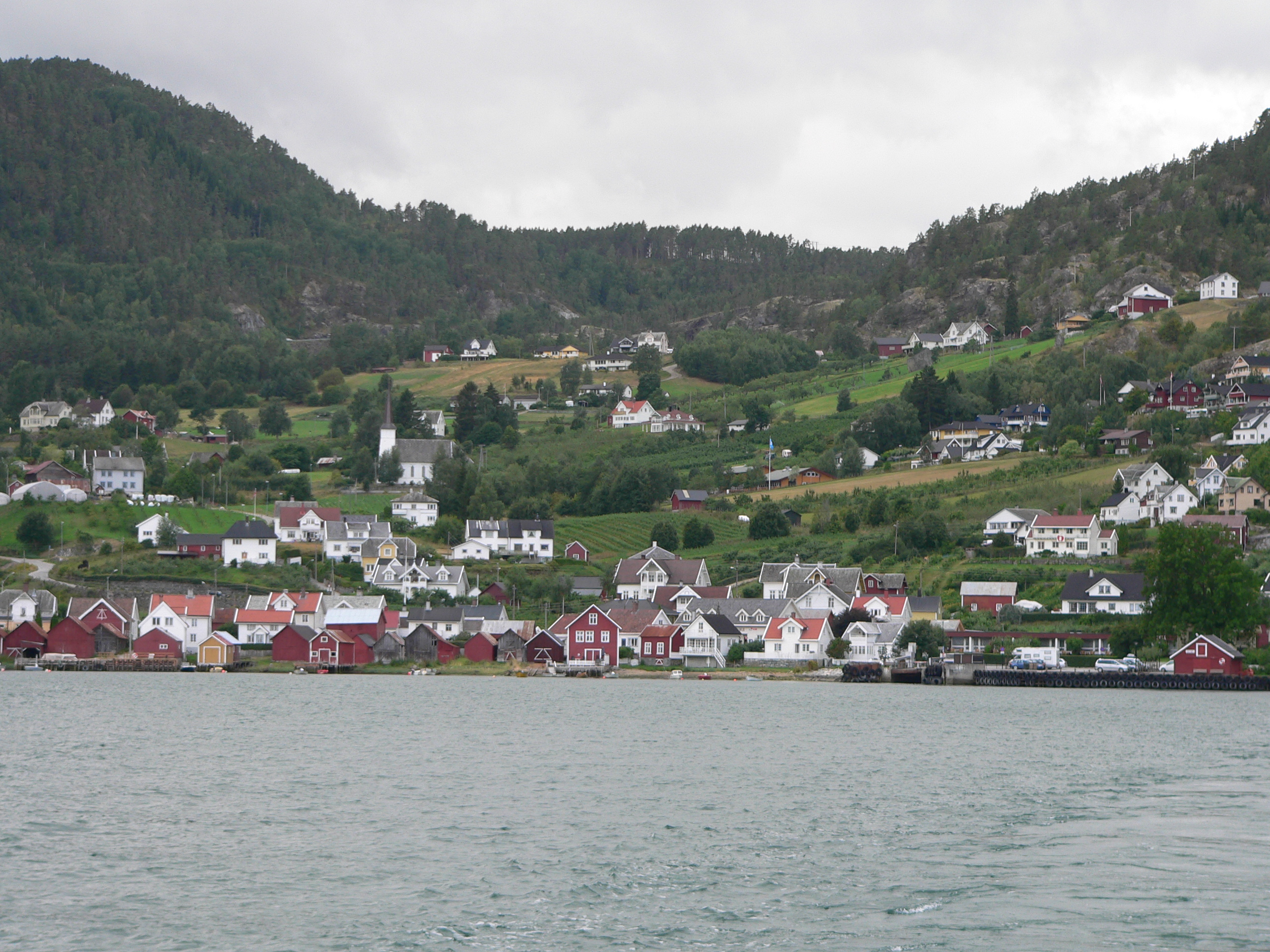 Solvorn